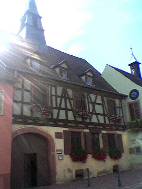 Haustafel in KAYSERSBERG, Elsass: "EGLISE PROTESTANTE - MAISON NATALE DU Dr ALBERT SCHWEITZER - 14 JANVIER 1875". Foto von Jakob Vetsch, 6. September 2006, 16 Uhr.